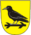 Znak obce Kryry